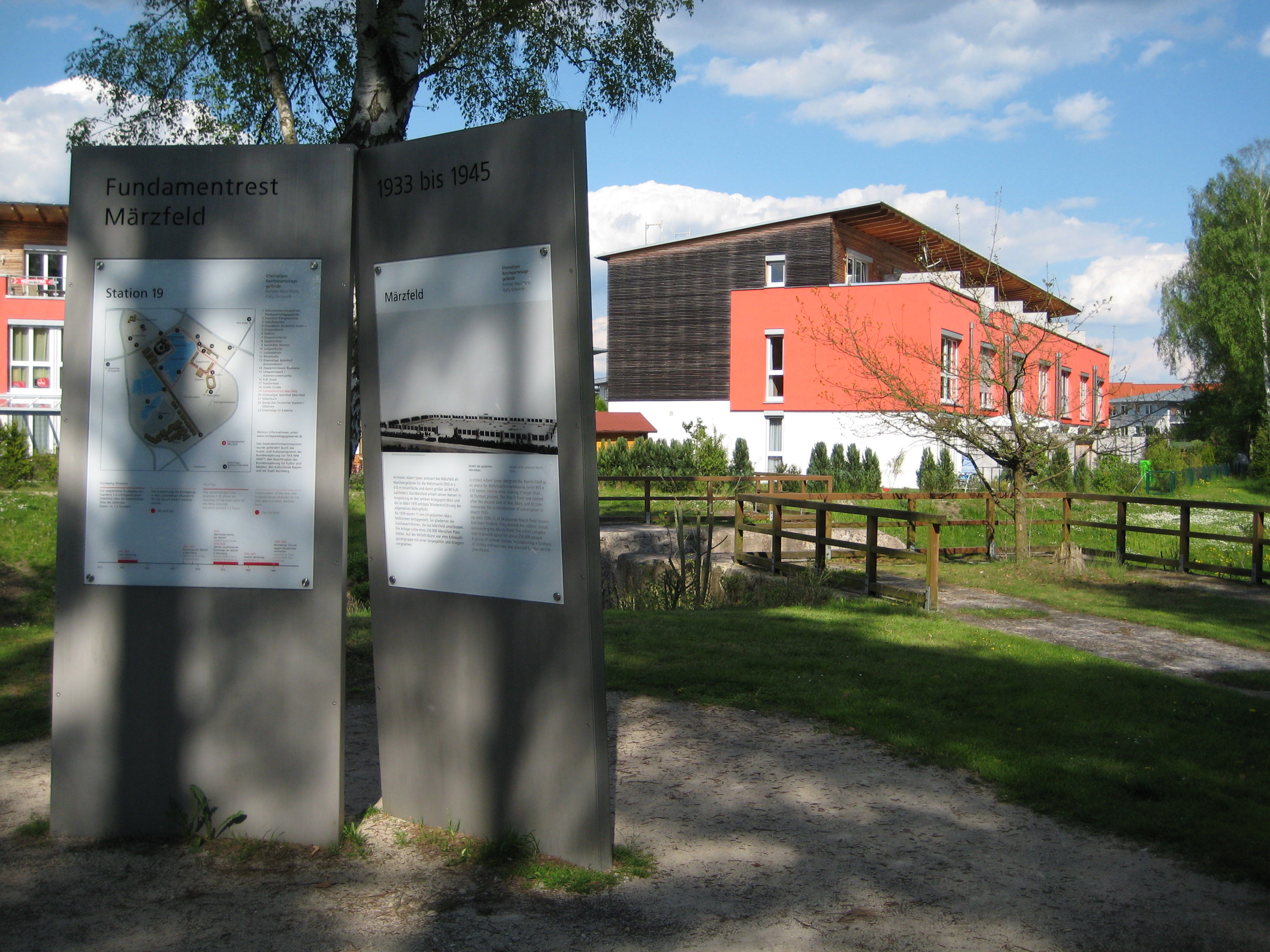 Märzfeld, Infotafel in Nürnberg